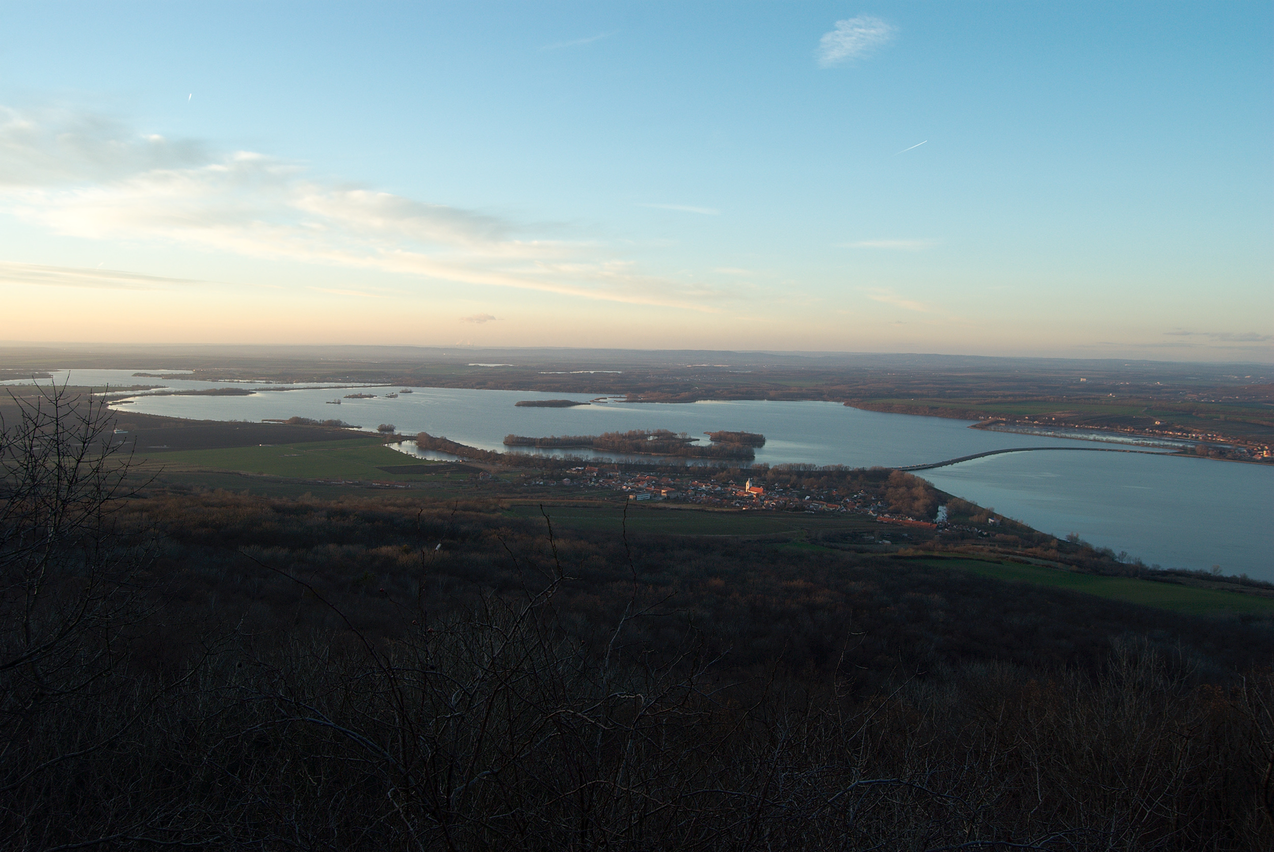 Moravská vodní nádrž Nové Mlýny-střed. V popředí jsou vidět Dolní Věstonice. Vyfoceno ze zříceniny Dívčí hrady.